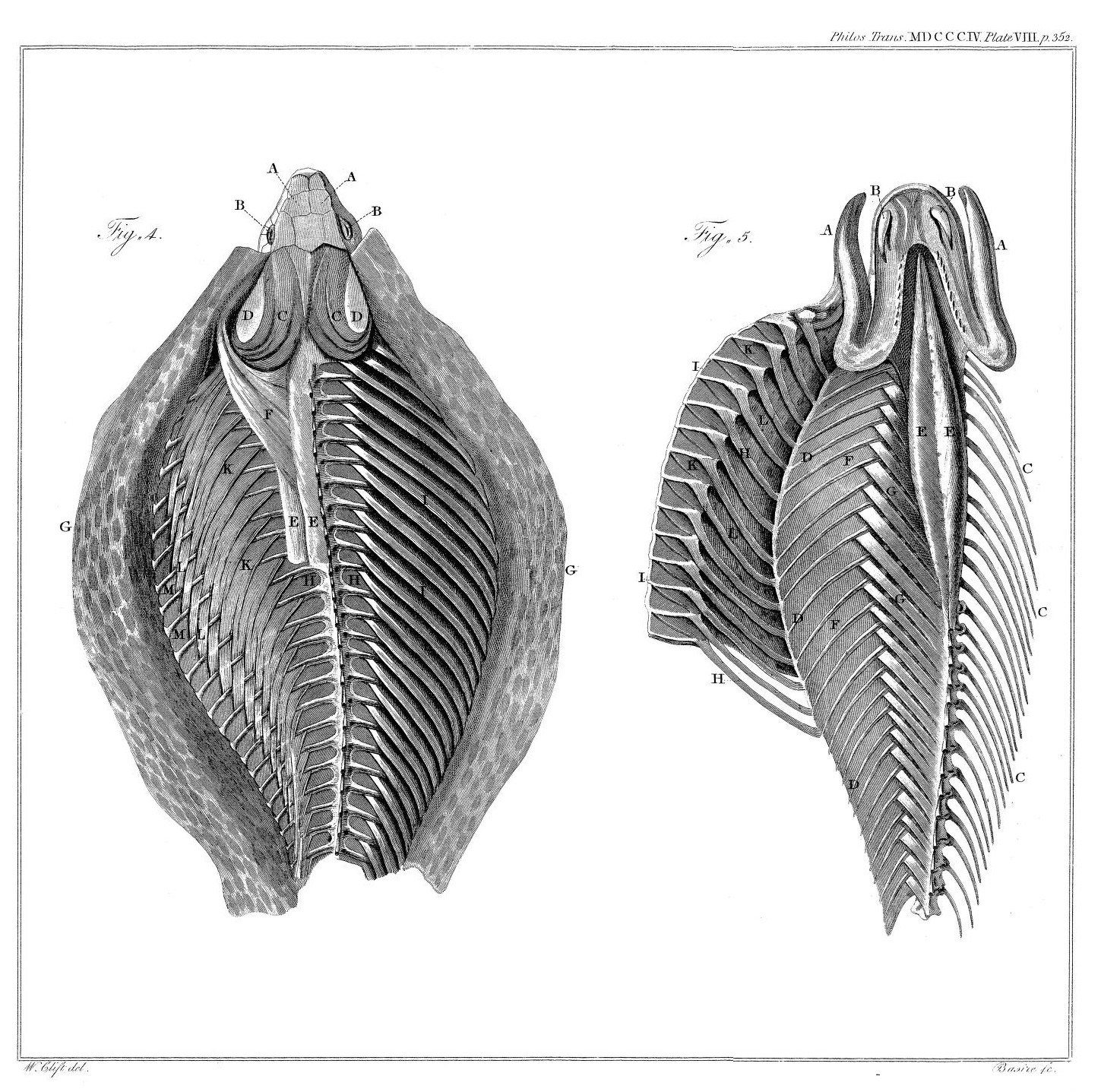 Cobra hood skeleton